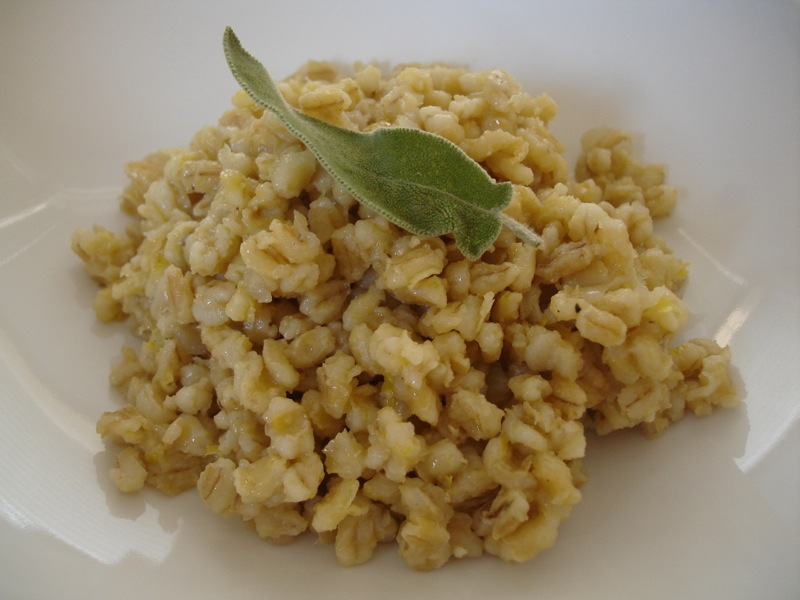 Lemon Barley Pilaf